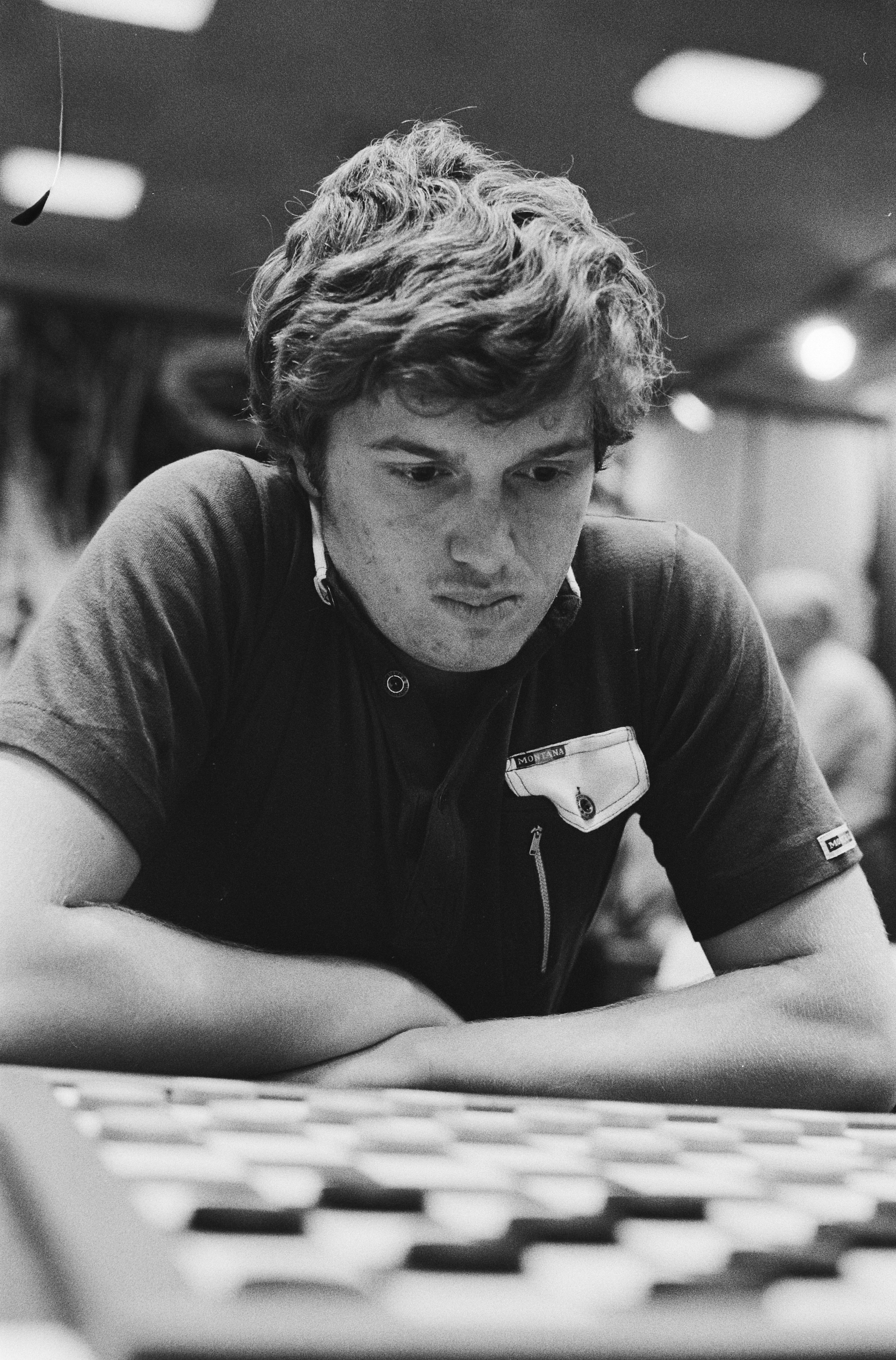 Collectie / Archief : Fotocollectie Anefo Reportage / Serie : Dam-achtkamp in Amsterdam Beschrijving : Wladimir Wirny (Rusland) Datum : 14 juli 1983 Locatie : Amsterdam, Noord-Holland Trefwoorden : dammen, wedstrijden Persoonsnaam : Wirny, Wadim Fotograaf : Bogaerts, Rob / Anefo Auteursrechthebbende : Nationaal Archief Materiaalsoort : Negatief (zwart/wit) Nummer archiefinventaris : bekijk toegang 2.24.01.05 Bestanddeelnummer : 932-6496